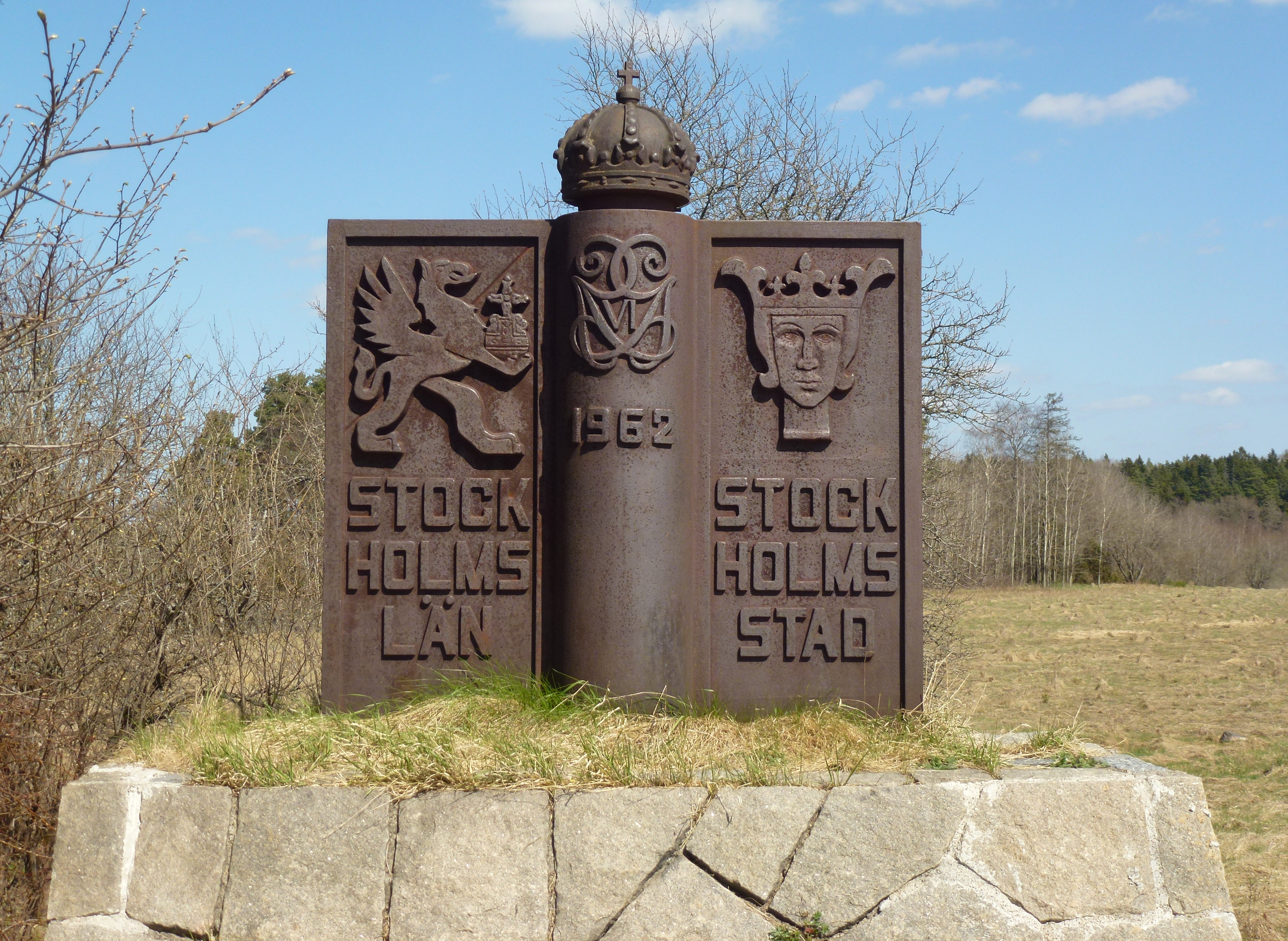 Gränsmärke Järfälla 1962